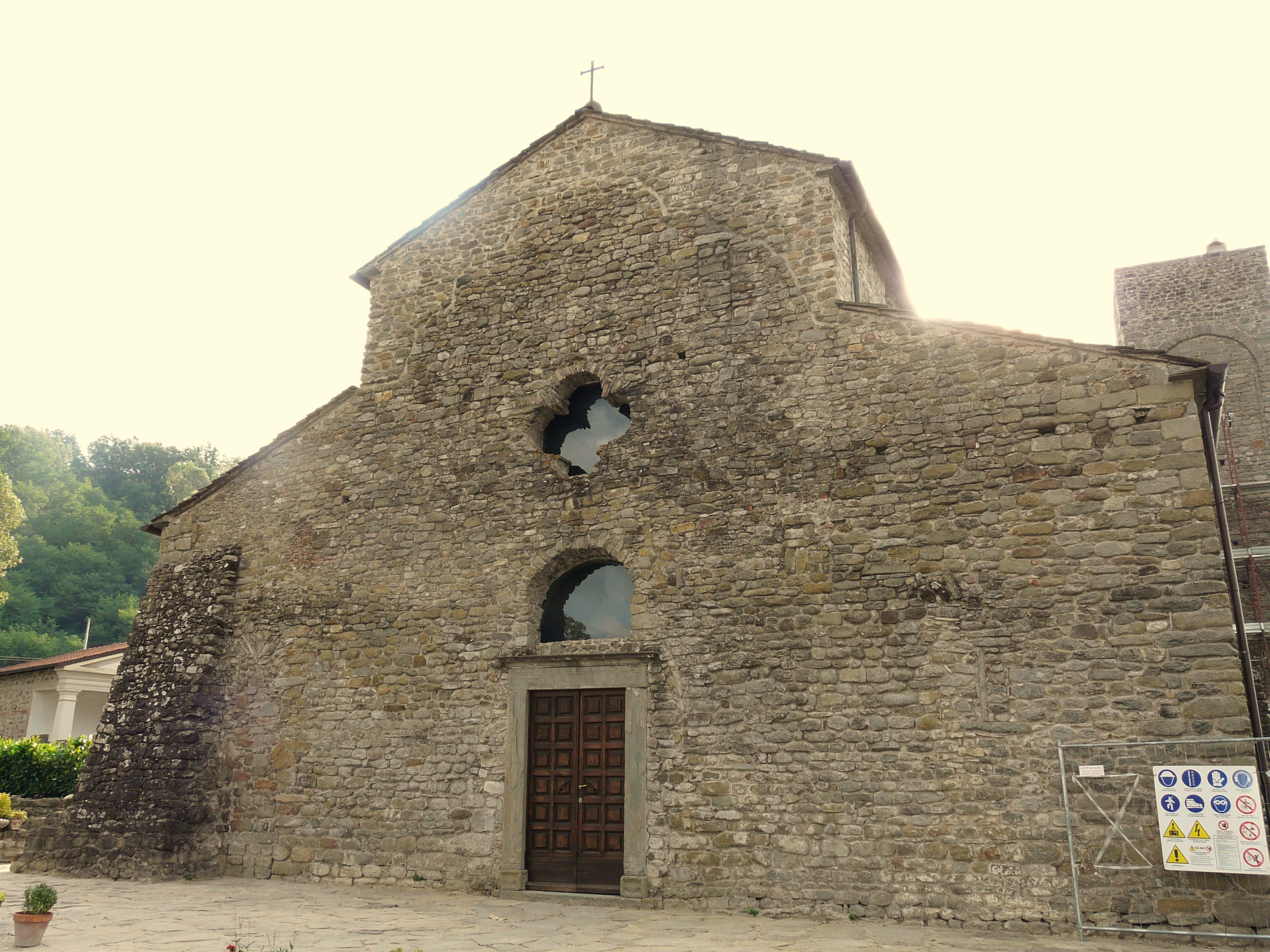 Pieve di Santo Stefano, Filattiera, Toscana, Italia